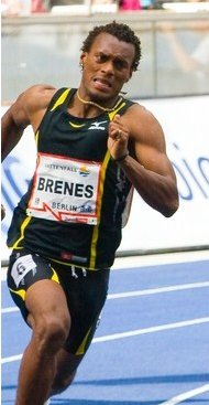 400 m during 2010 ISTAF Berlin (Nery Brenes)